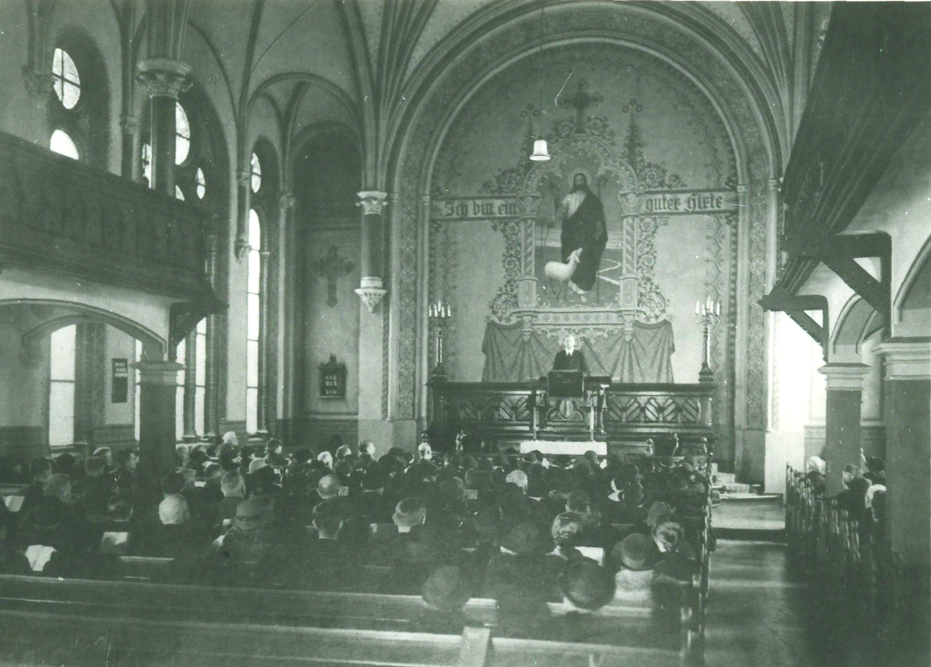 Elim-Kirche in Berlin-Friedrichshain um 1900